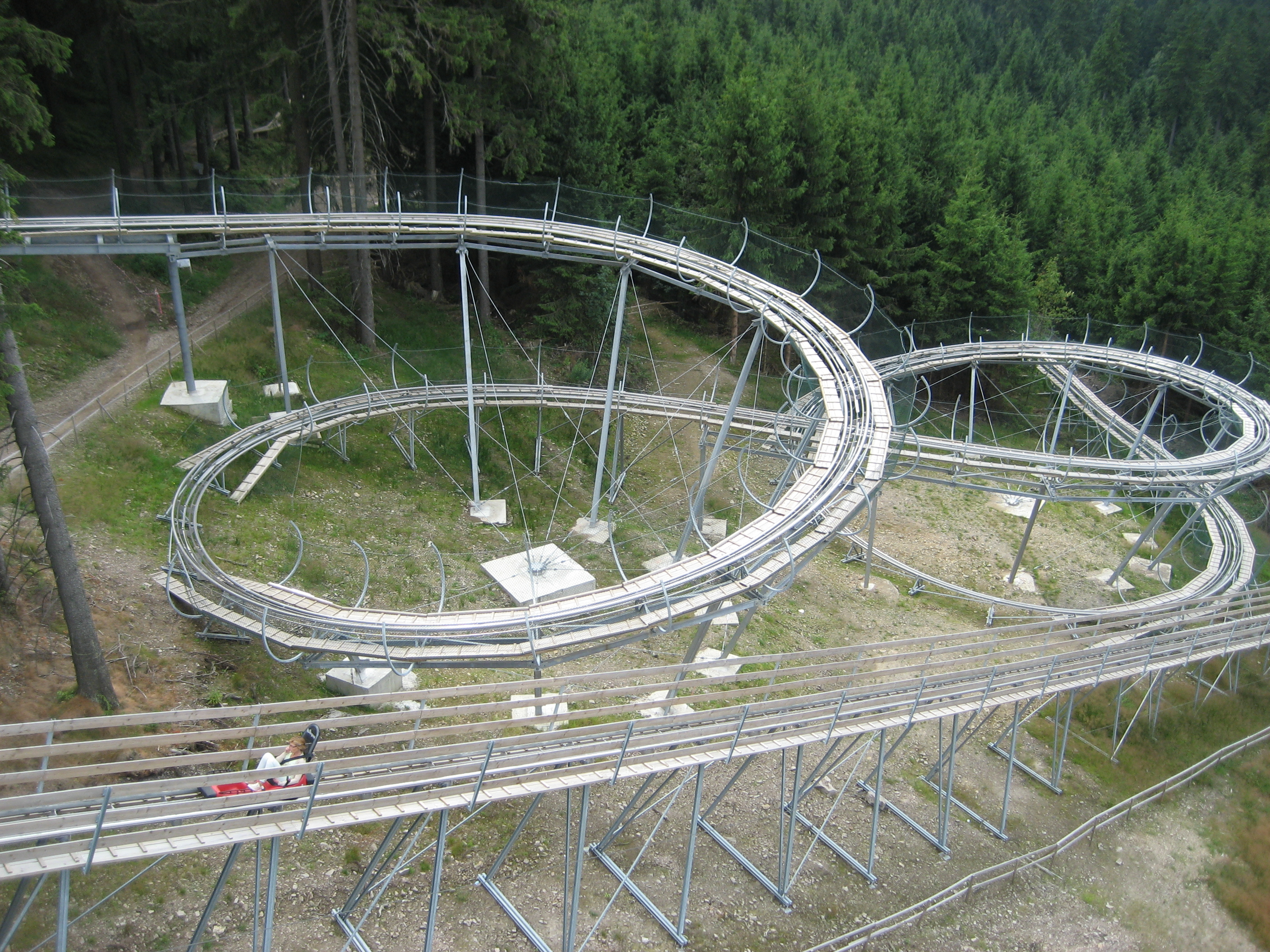 Blick von Bocksberg-Seilbahn auf die Sommerrodelbahn (Typ: Alpine Coaster) "BocksBergBob"; oberhalb von Hahnenklee, Harz